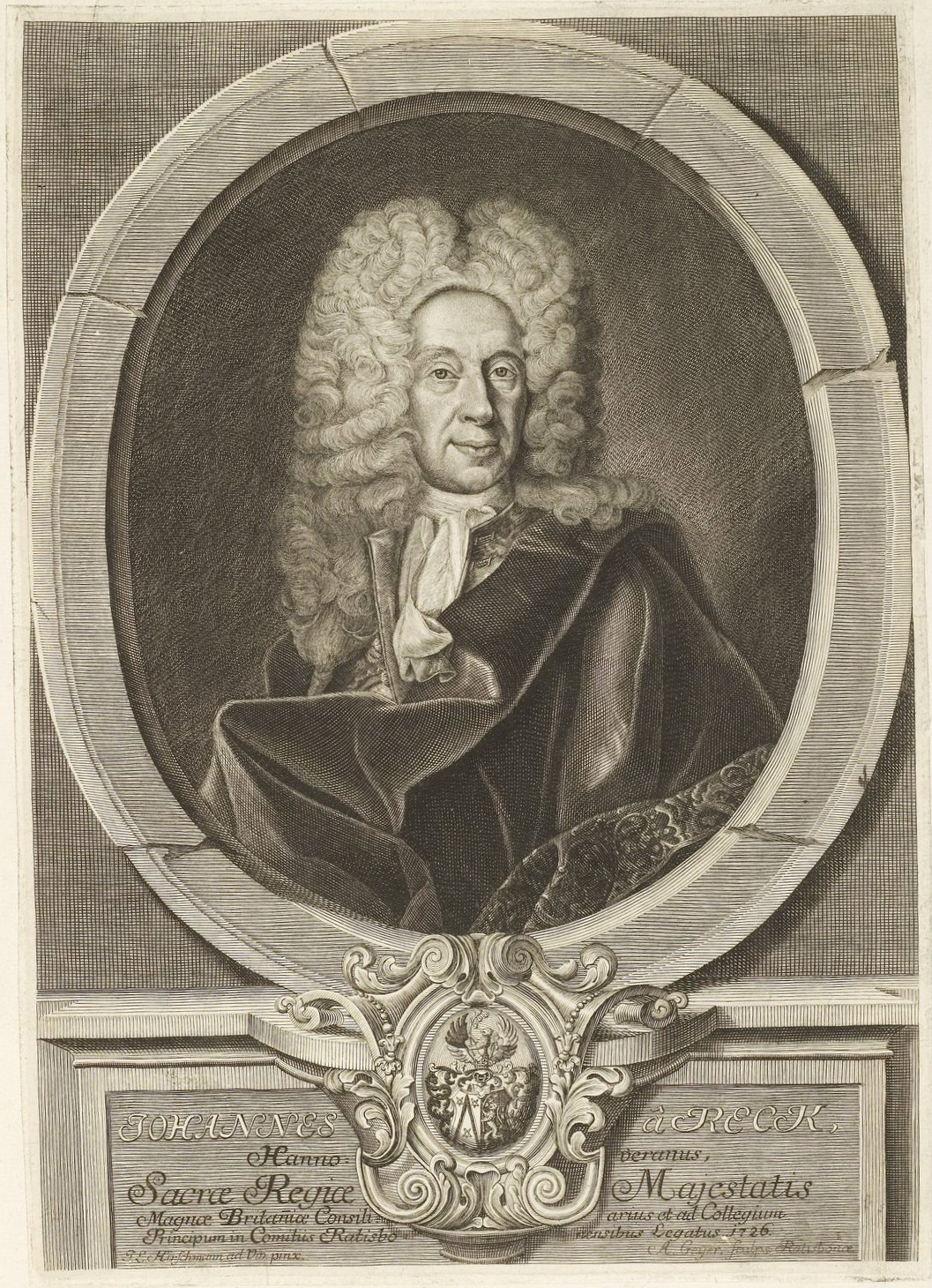 Grafik aus dem Klebeband Nr. 1 der Fürstlich Waldeckschen Hofbibliothek Arolsen Motiv: Johannes von Reck, königlich-englisch und kurfürstlich-hannoverischer Rat und Reichstagsgesandter in Regensburg GND: 1019762144